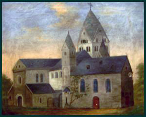 Medaruskirche in Bendorf